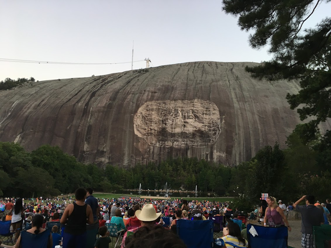 Her ses Stone Mountain set fra den nordlige side før at lasershowet begynder